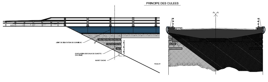 Exemple de culée d'un ouvrage d'art courant auteur: Christophe CHERON et Thomas LAVIGNE, Architecte